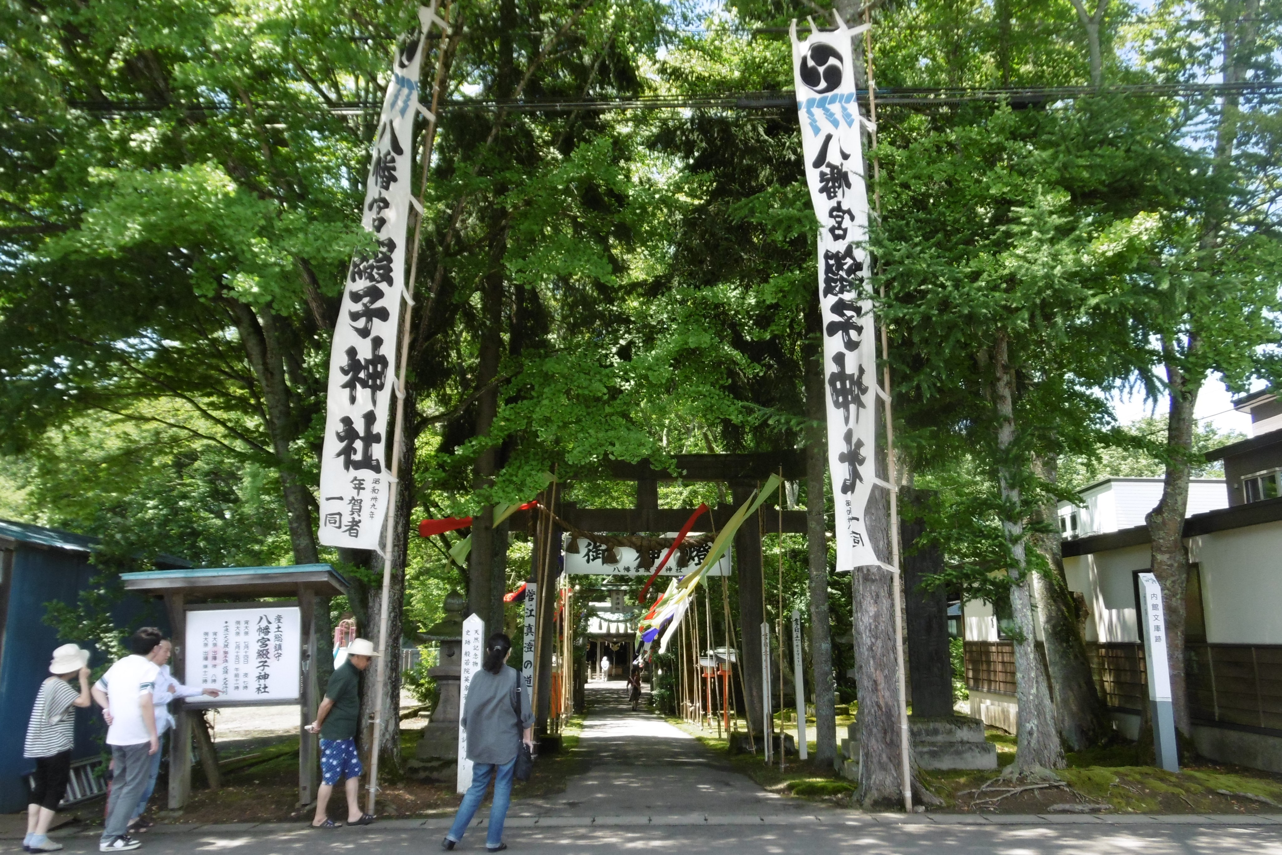 八幡宮綴子神社